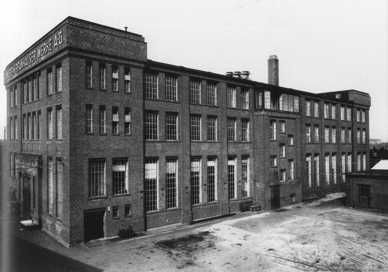 Produktionsgebäude der Langbein-Pfanhauser Werke AG (LPW) (Spezialfabrik für Galvanotechnik) in Leipzig, Torgauer Straße 76, um 1925.